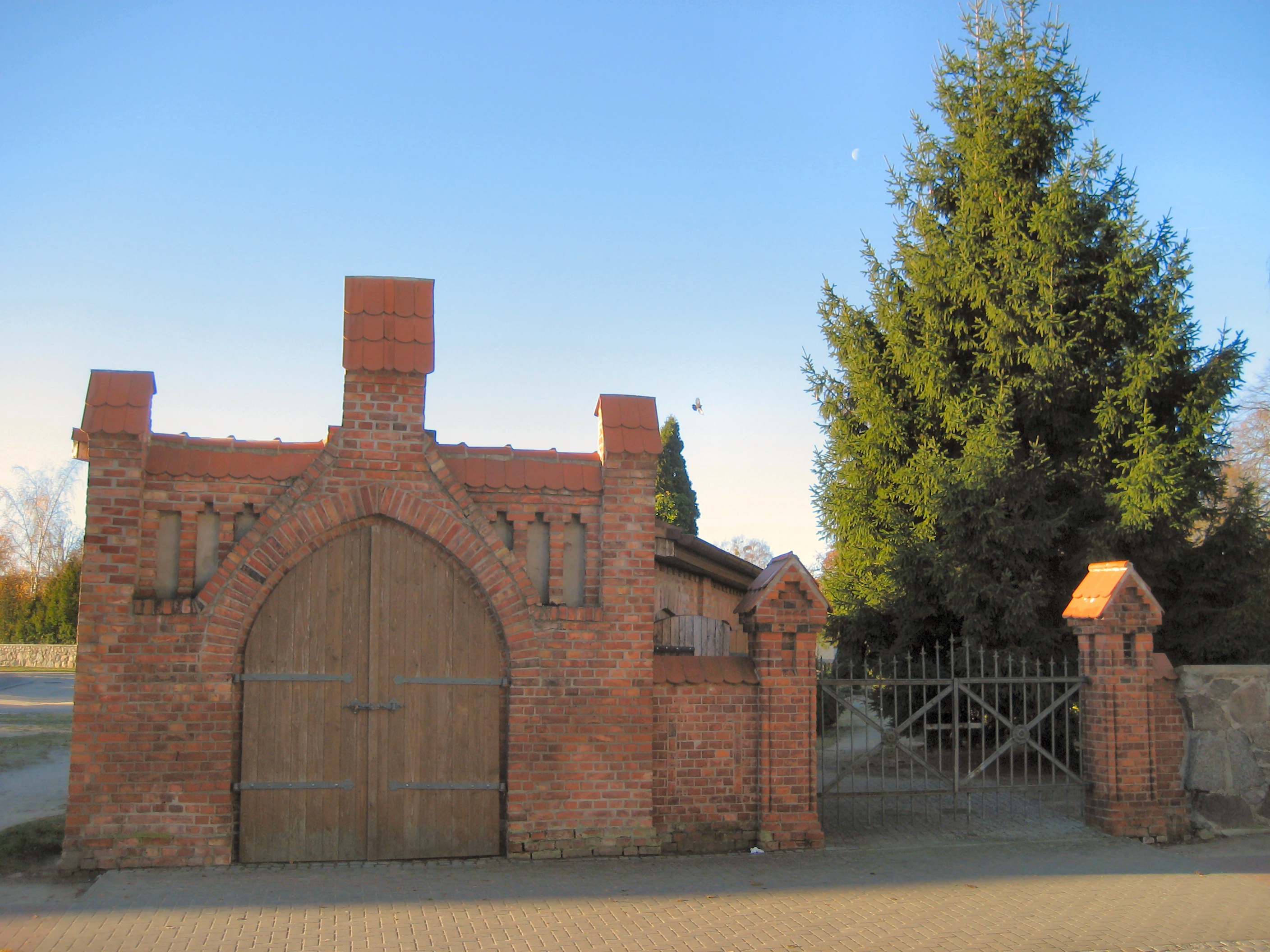 Das alte Eingangsportal zum Löcknitzer Friedhof in der Friedrich-Engels-Straße.